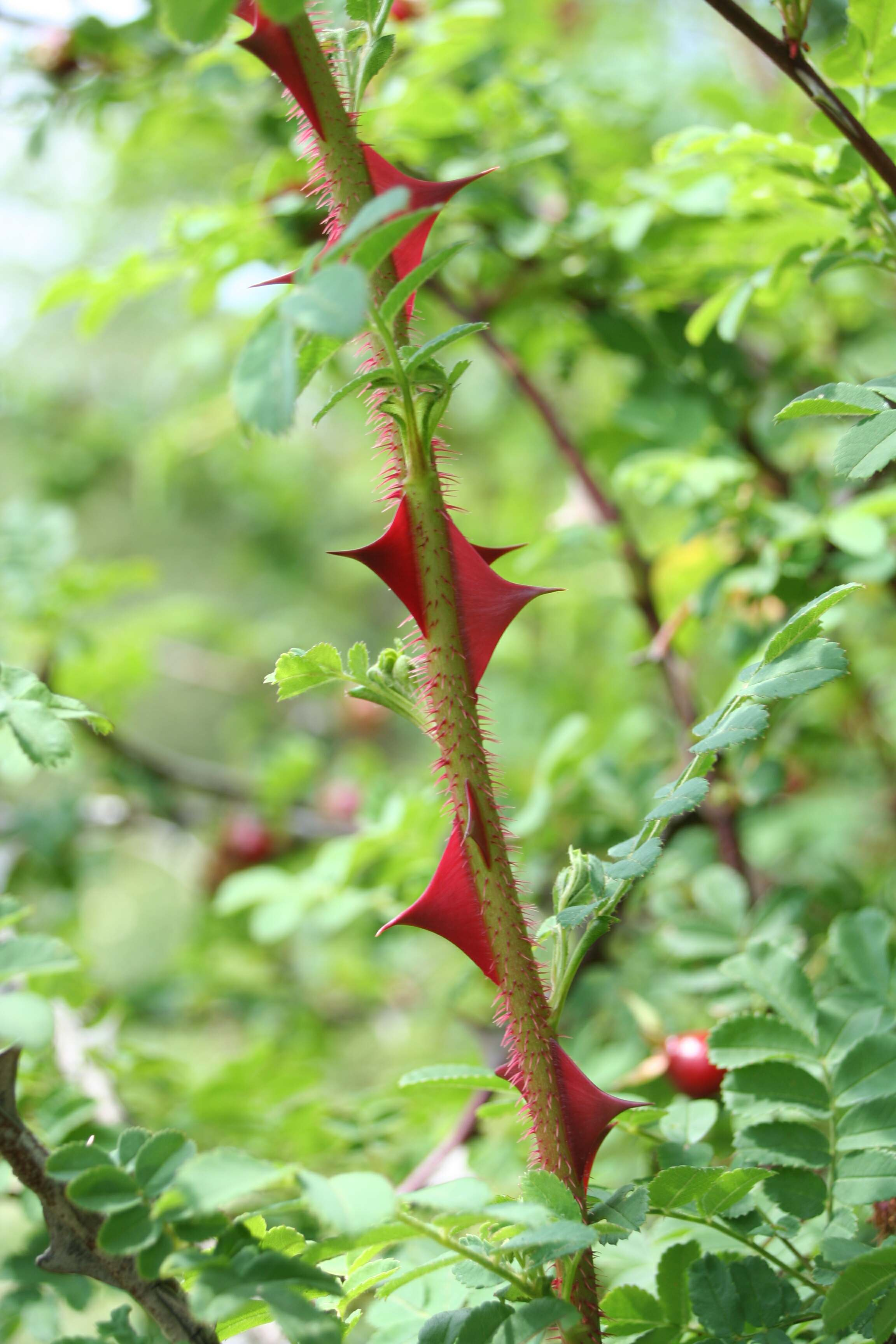 Rosa omeiensis f. pteracantha, roseraie de paysage de Bagatelle - Paris (France)